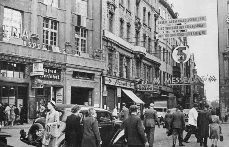 Leipzig, Hainstraße, Messeamt Von den Vorbereitungen zur Leipziger Herbstmesse vom 2. - 7. September 1951 In diesen Tagen werden in Leipzig die letzten Vorbereitungen zur diesjährigen Herbstmesse vom 2.-7.Septemper 1951 getroffen. UBz: Blick in die Hainstrasse mit dem Messeamt (links) wenige Tage vor Beginn der Herbstmesse. Aufn.: Illus Rössing 596.AV. Berlin W 8 30.8.1951